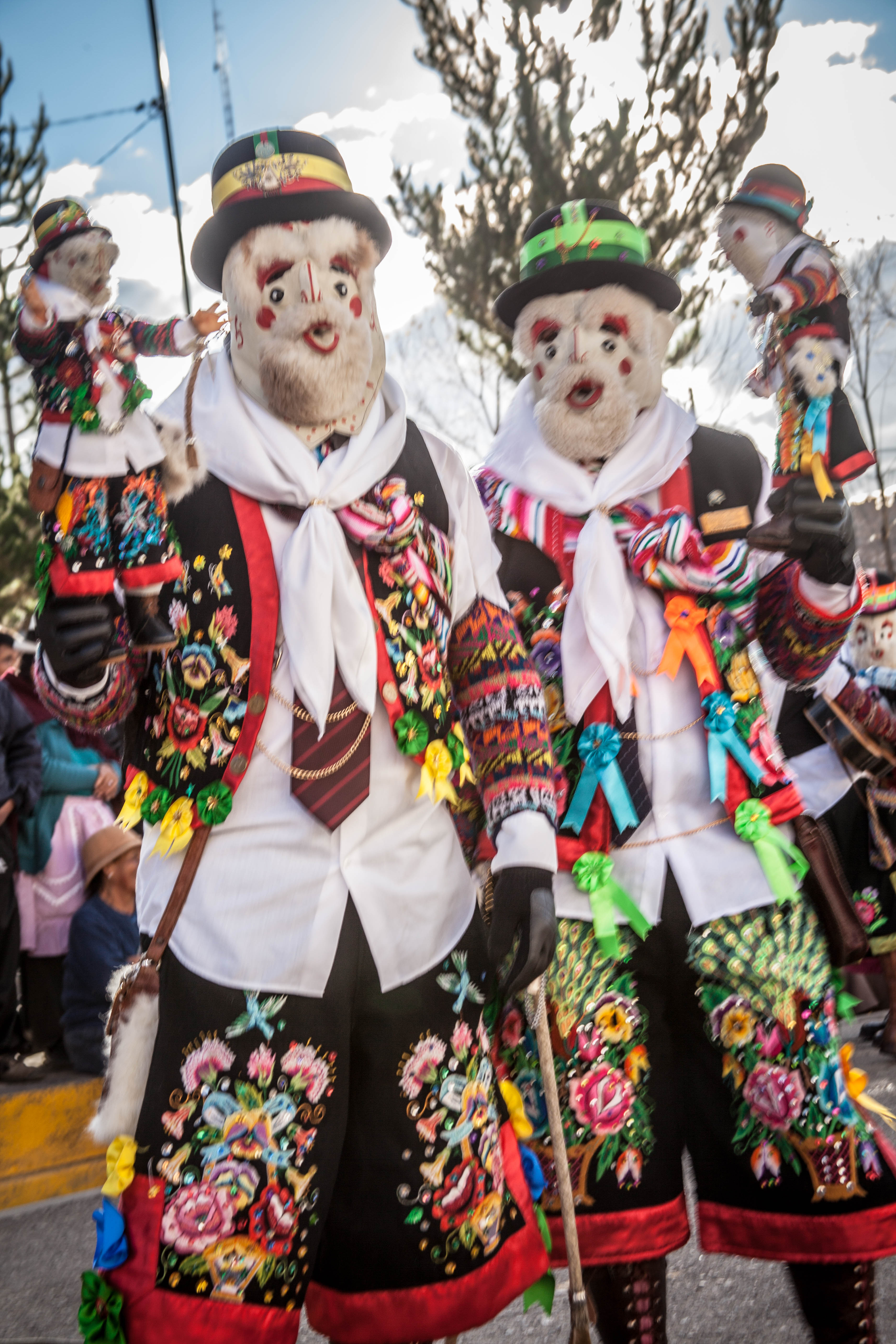 El Chuto, es un personaje que integra el baile de la Tunantada, Patrimonio de la Nación, Originaria de Jauja-Perú.